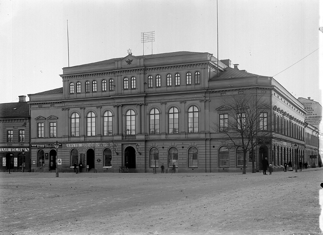 Frimurarelogen, Karlstad 1922 Bildnr: SEVA_0703_009b